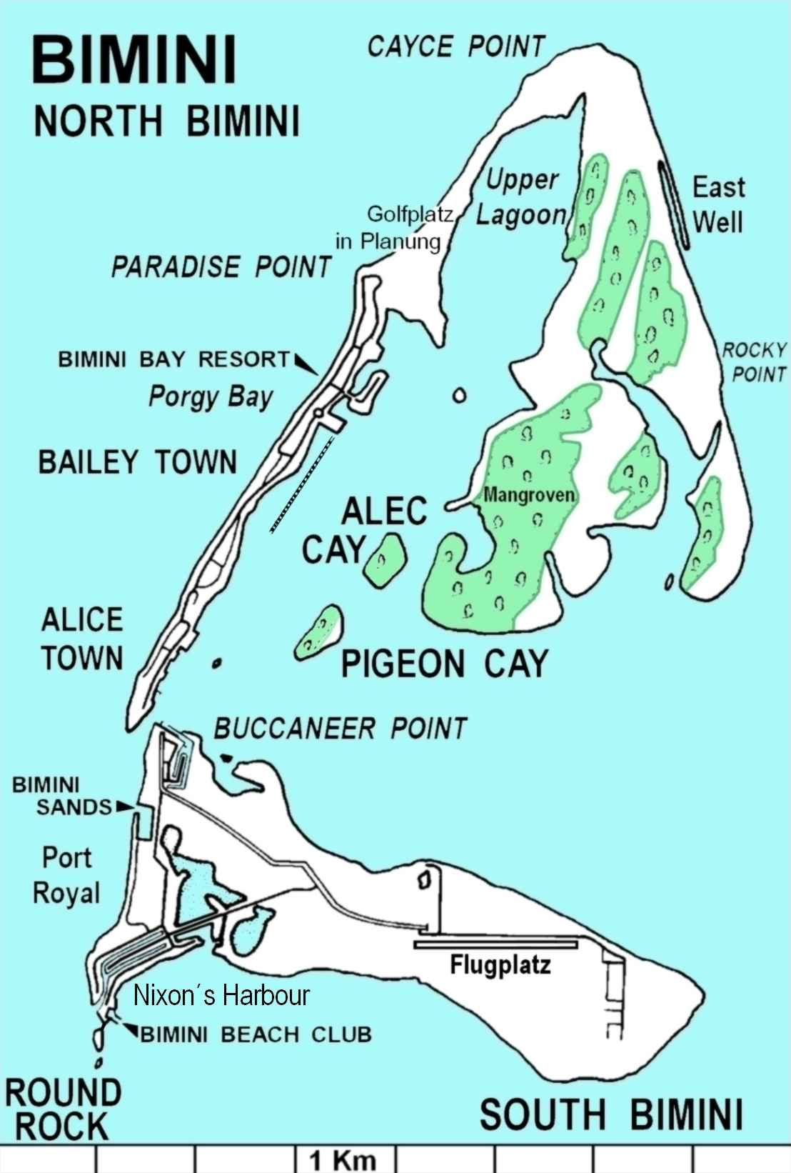 Karte von North Bimini